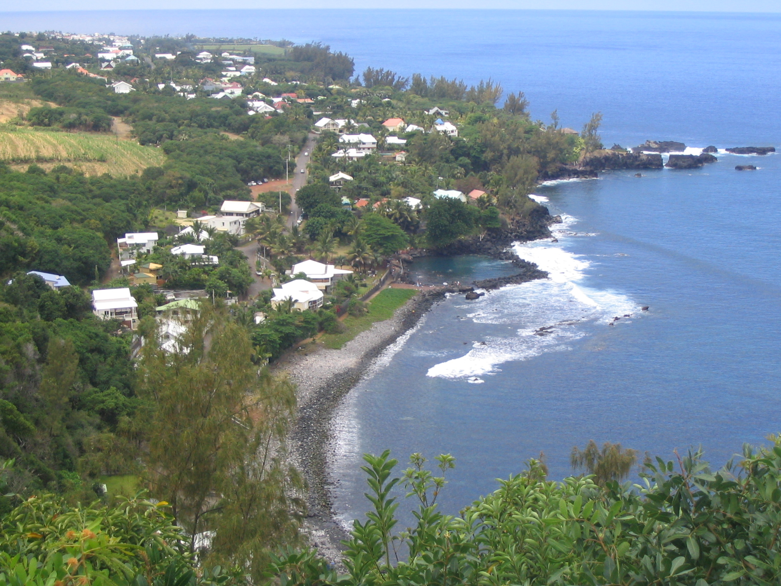 plage de Manapany vue de la RN3 own work